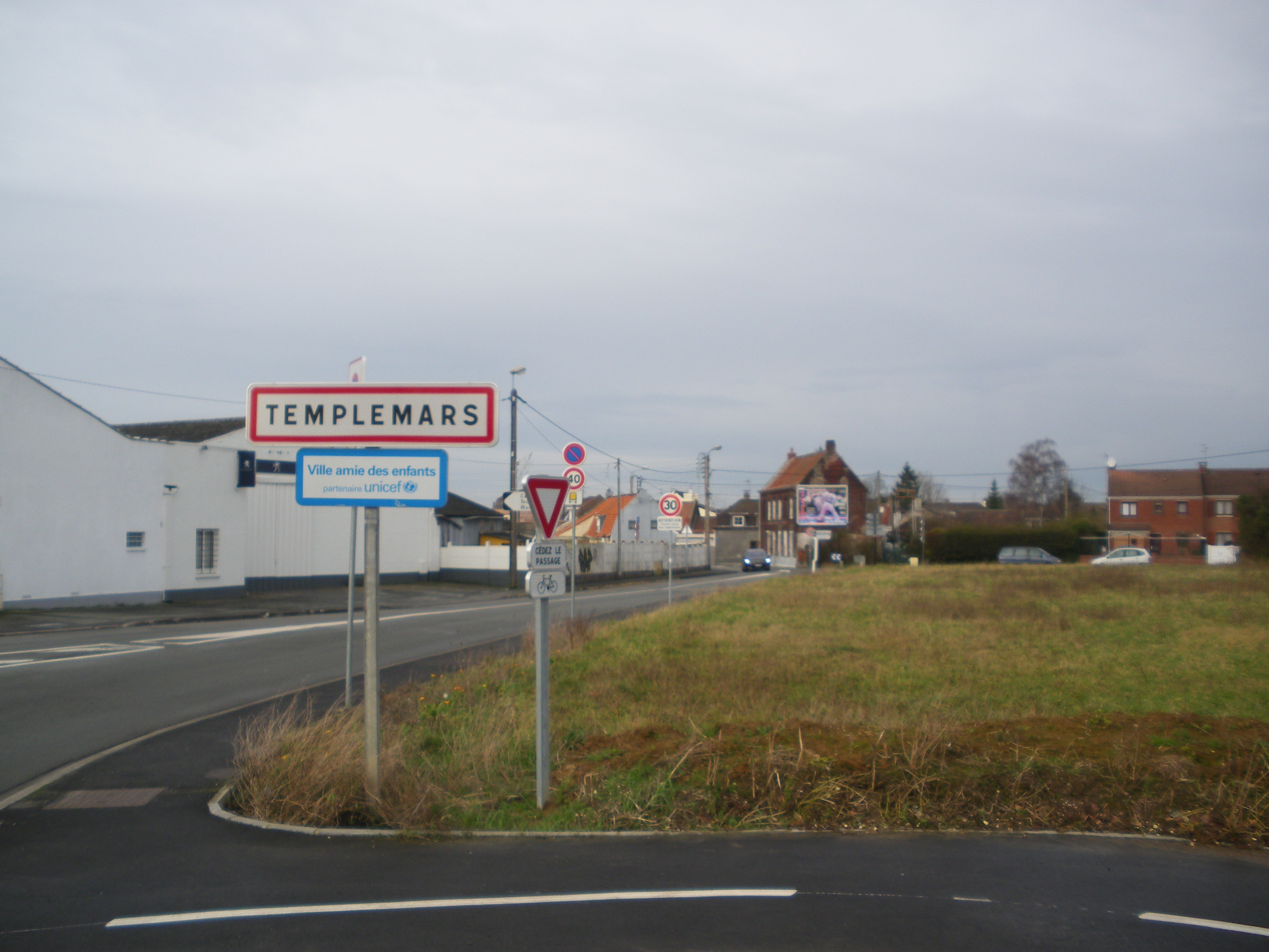 Panneau d'entrée de la commune de Templemars.